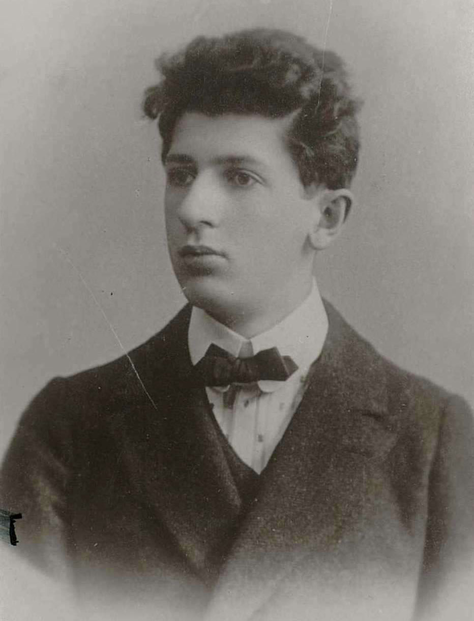 Евгений Федорович Гировский